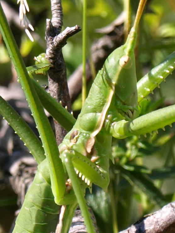 Fűrészeslábú szöcske a Budai-hegységben